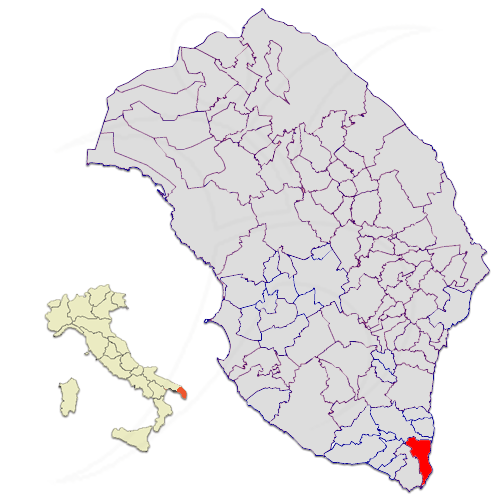 Il territorio del comune di Gagliano del Capo in provincia di Lecce